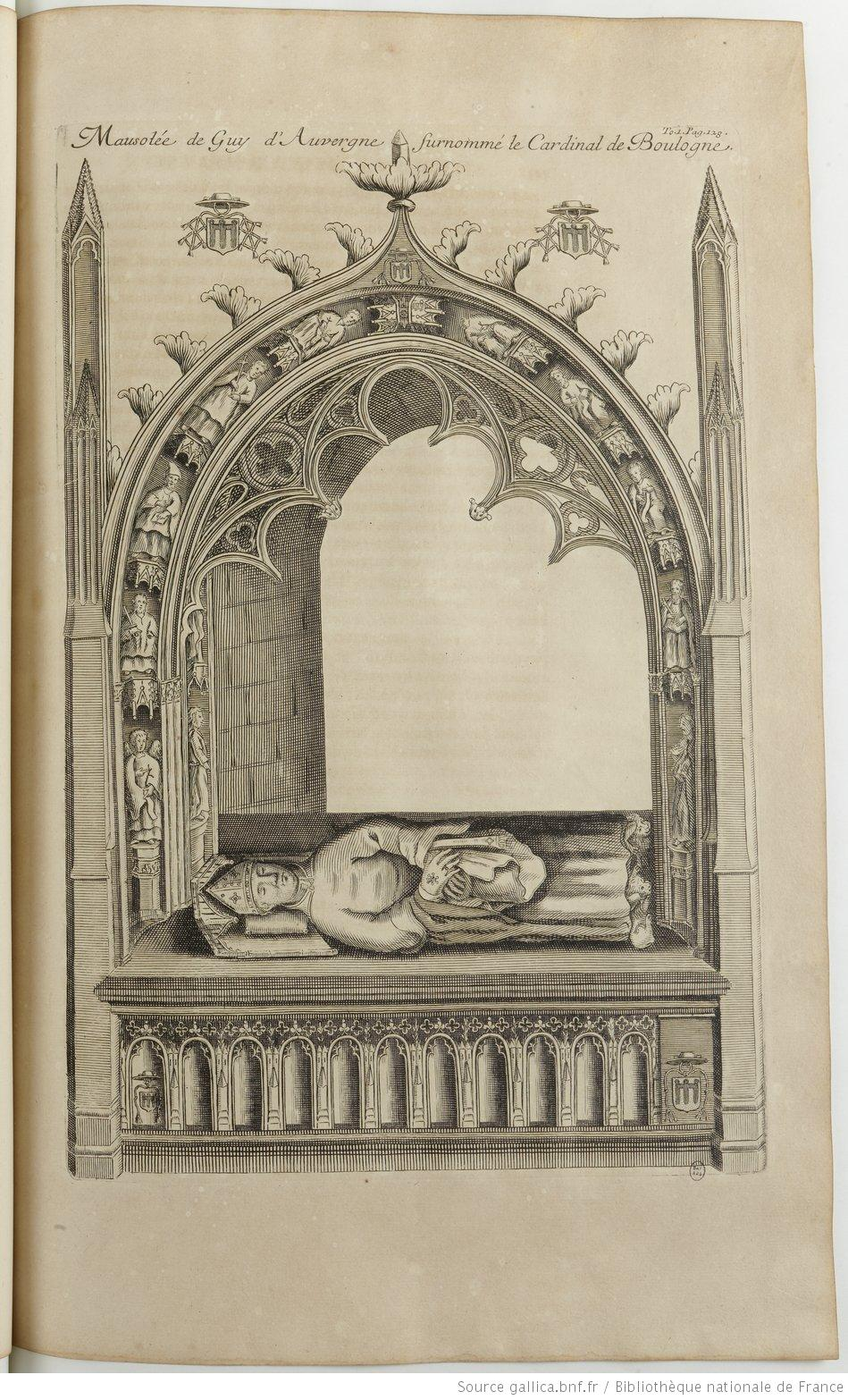 Tombeau de Guy de Boulogne, cardinal français, archevêque de Lyon et ambassadeur du pape. Étant de la famille d'Auvergne, il est enterré dans la nécropole de l'abbaye du Bouschet.